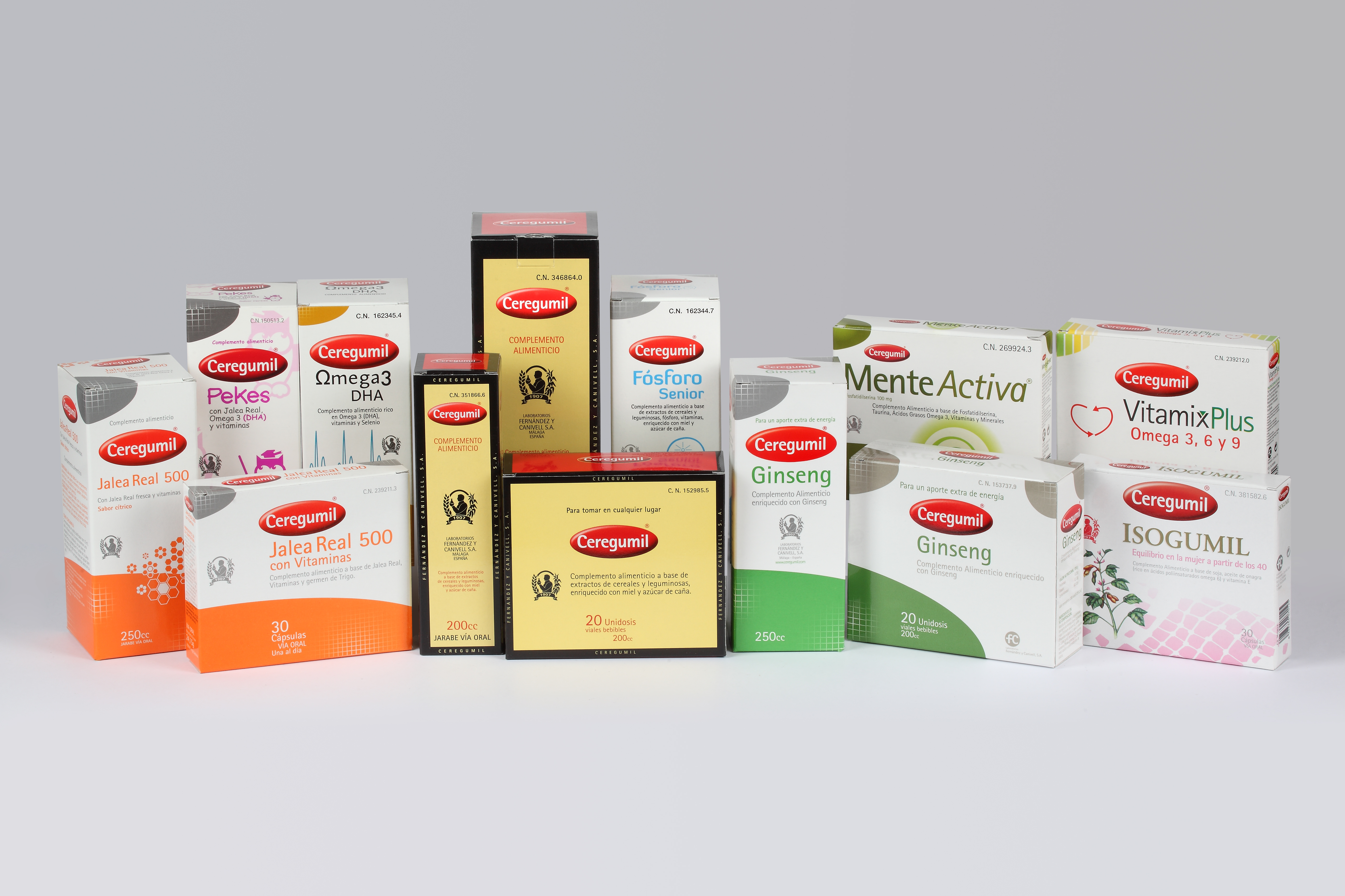 Vademecum de los productos de la marca Ceregumil